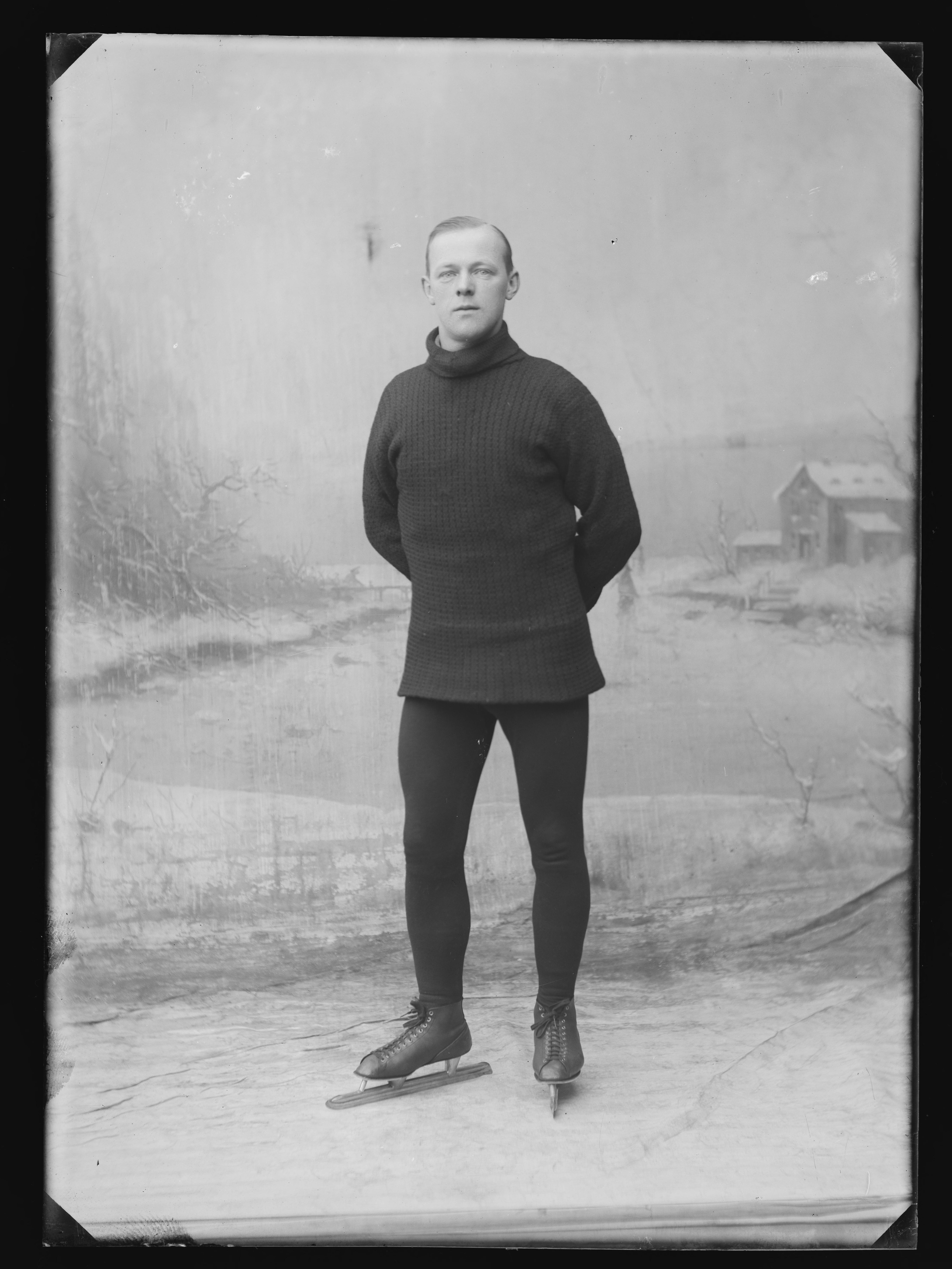 Bildet er hentet fra Nasjonalbibliotekets bildesamling. Anmerkninger til bildet var: Påskrift arkivark: Ole Olsen Arkivnummer: 353